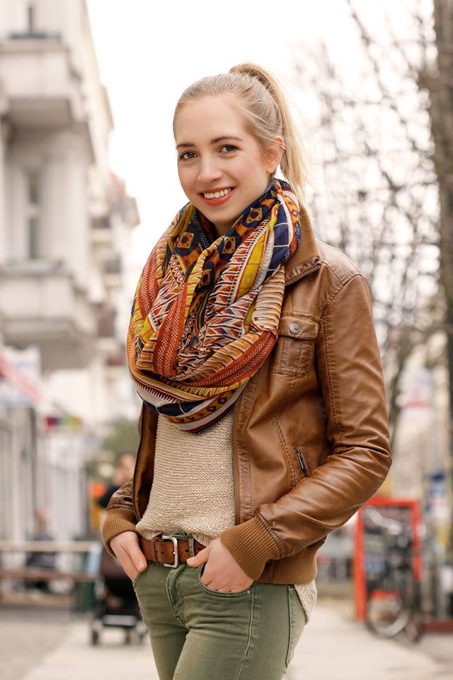 Laura Pape in Berlin, 2013